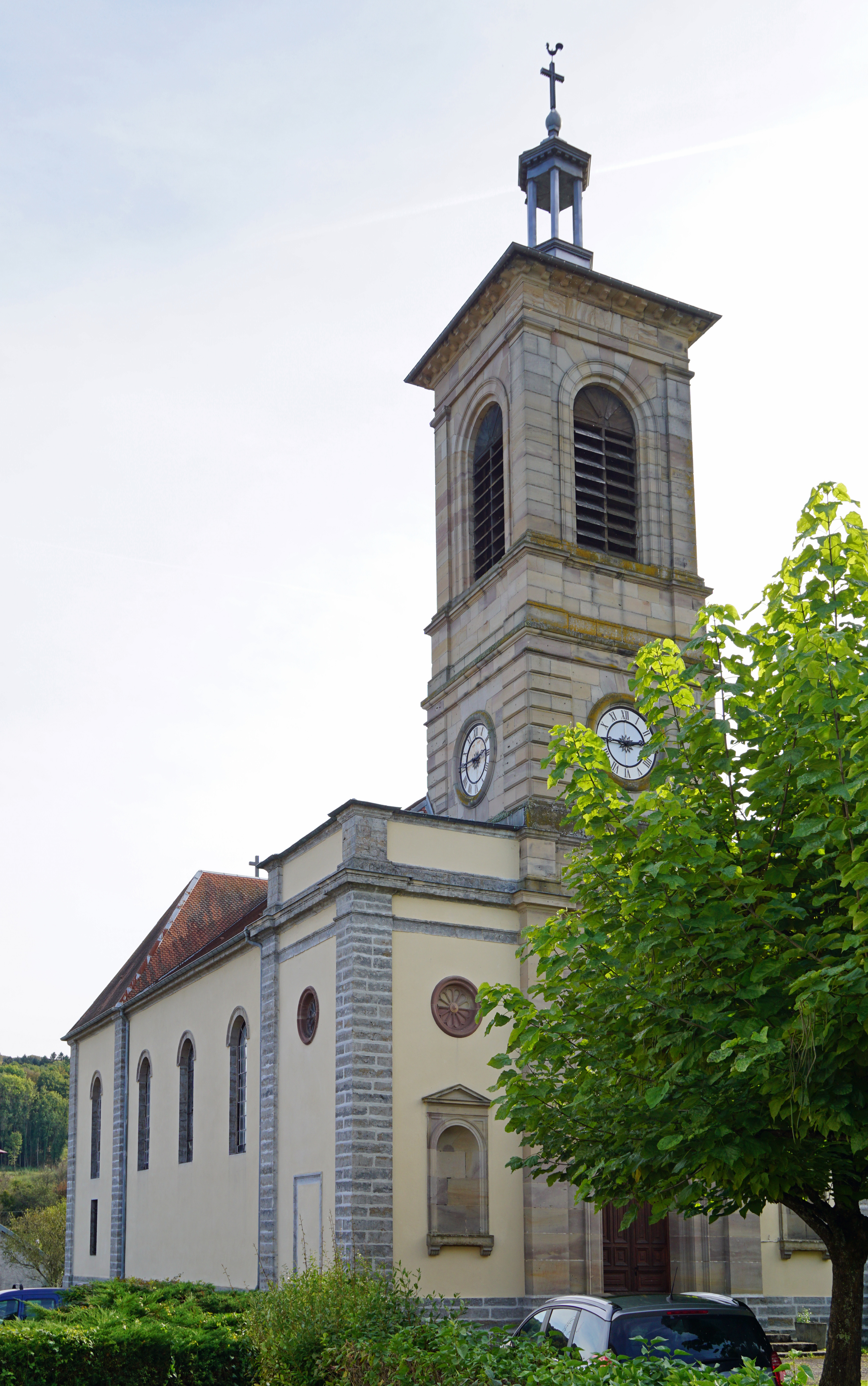 L'église de Cubrial.